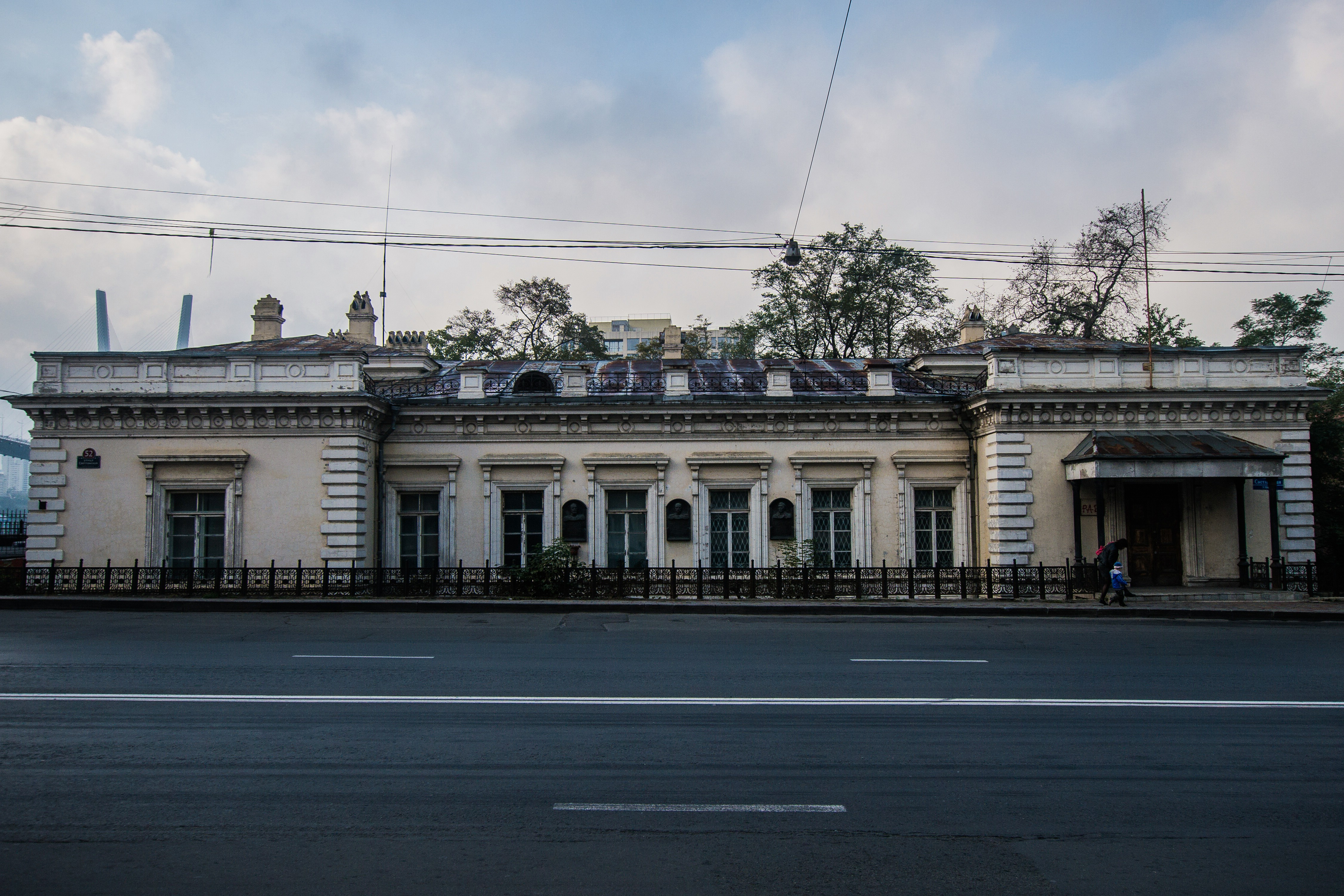 Дом генерал-губернатора (Приморский край, Владивосток, Светланская улица, 52)